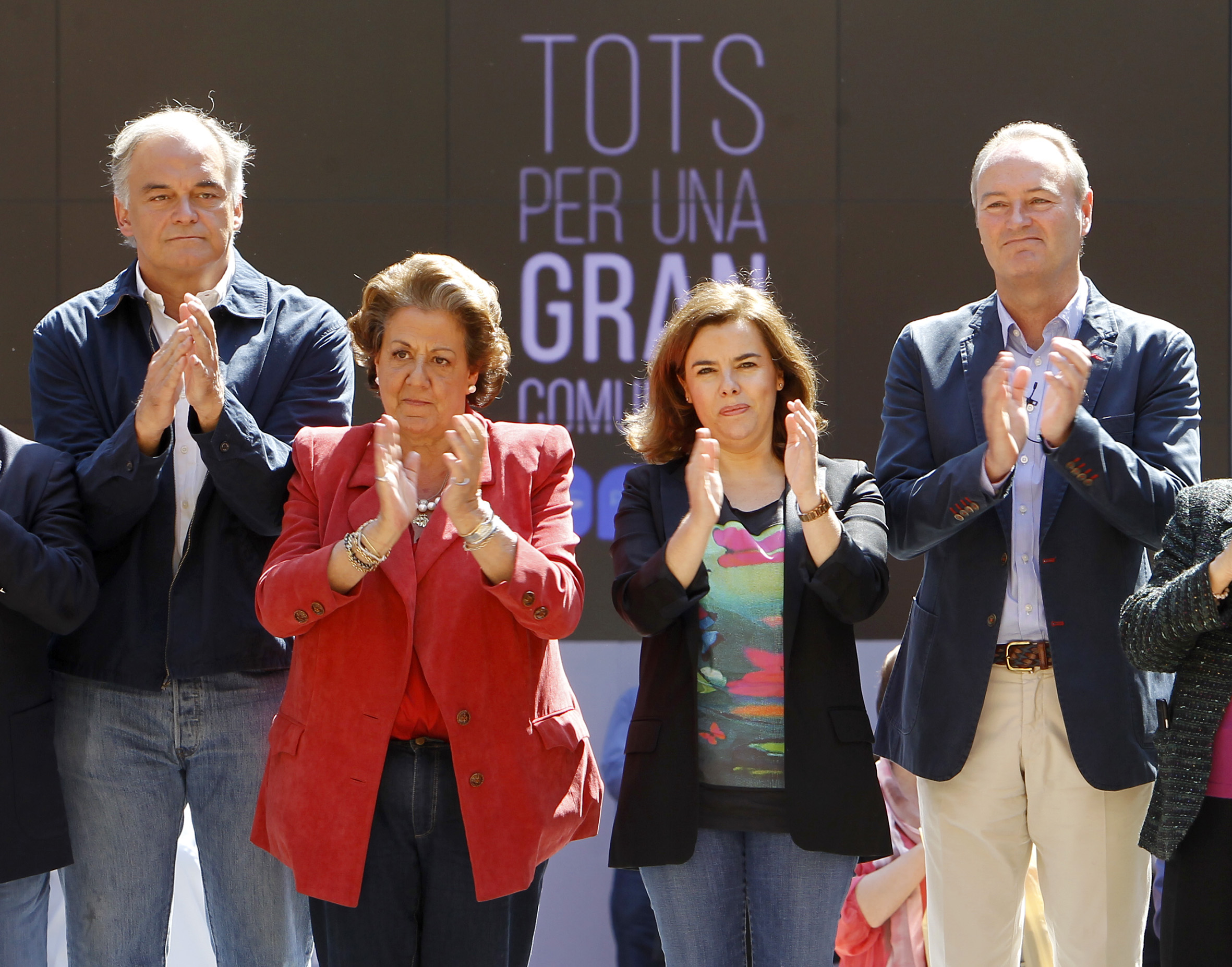 Acto de presentación de la candidatura de Alberto Fabra a la Generalitat Valenciana para las elecciones autonómicas y municipales